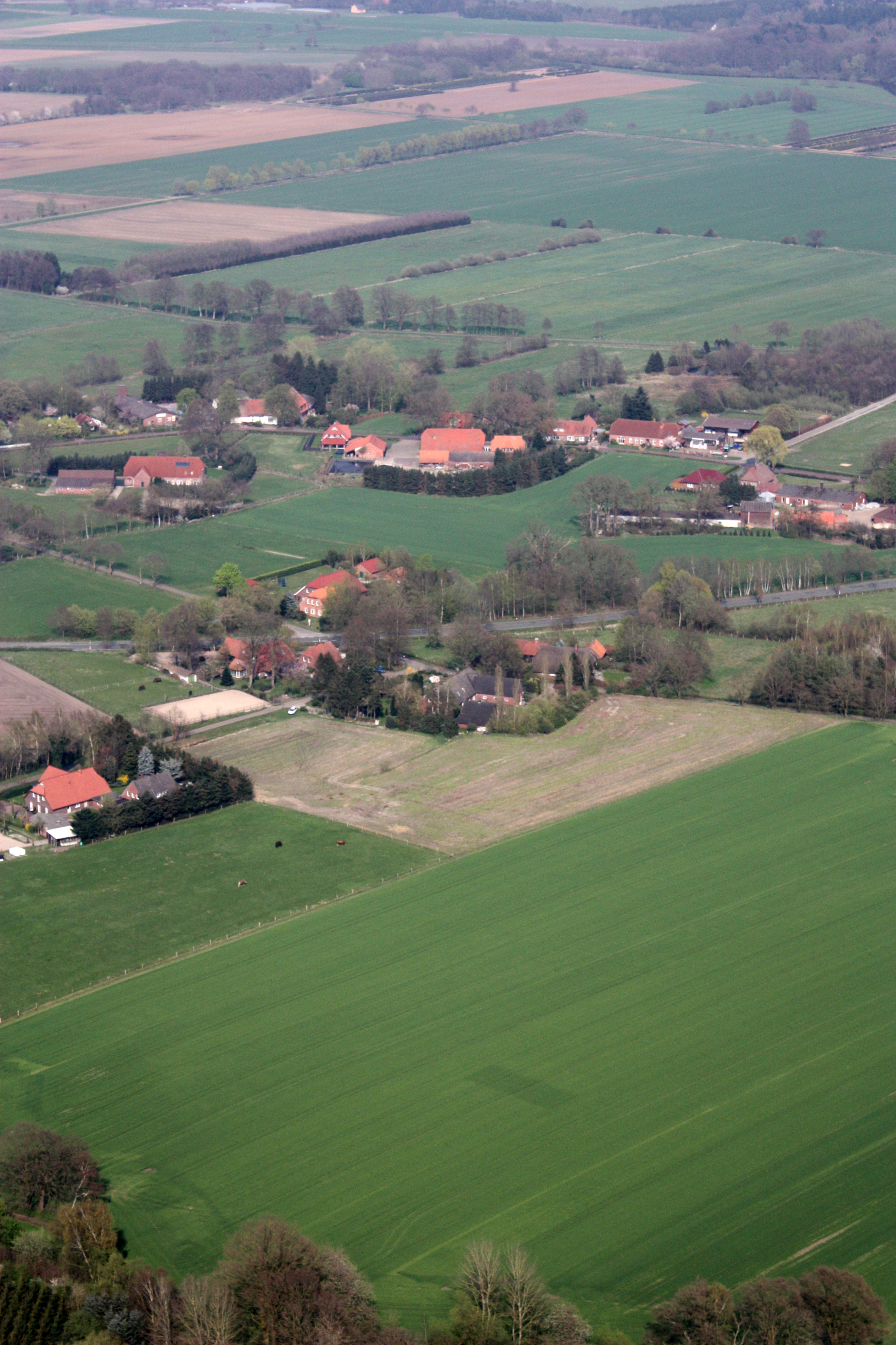 Wildeshausen, Landkreis Oldenburg, Niedersachsen